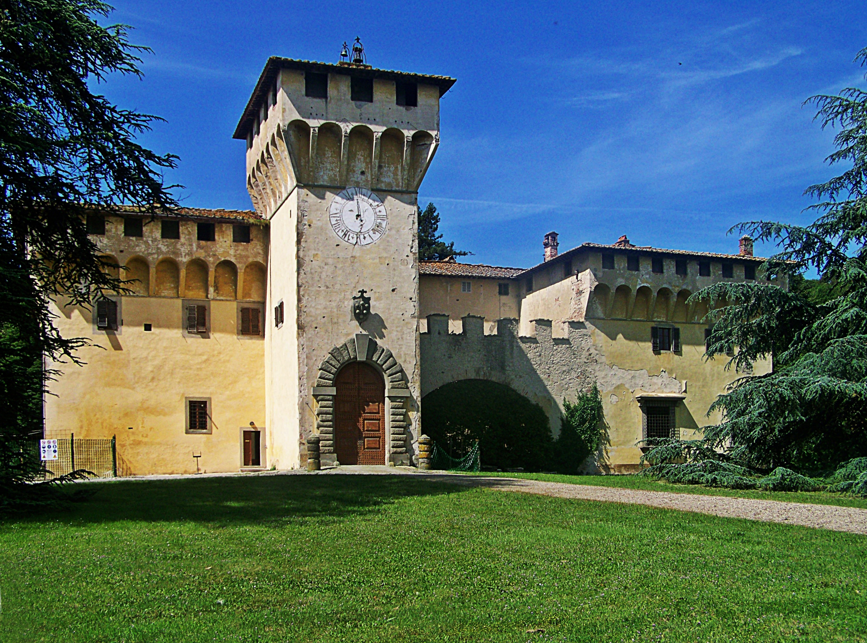 Villa